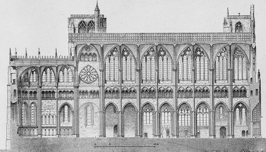 Coupe longitudinale dressée par Tony Desjardins de la primatiale Saint-Jean de Lyon. La façade est à droite, le chœur à gauche.